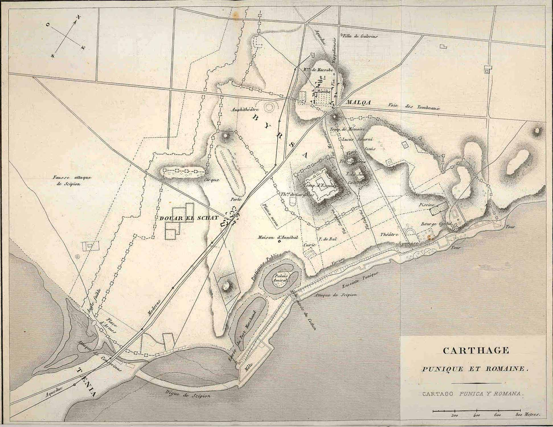 Carthage punique et romaine